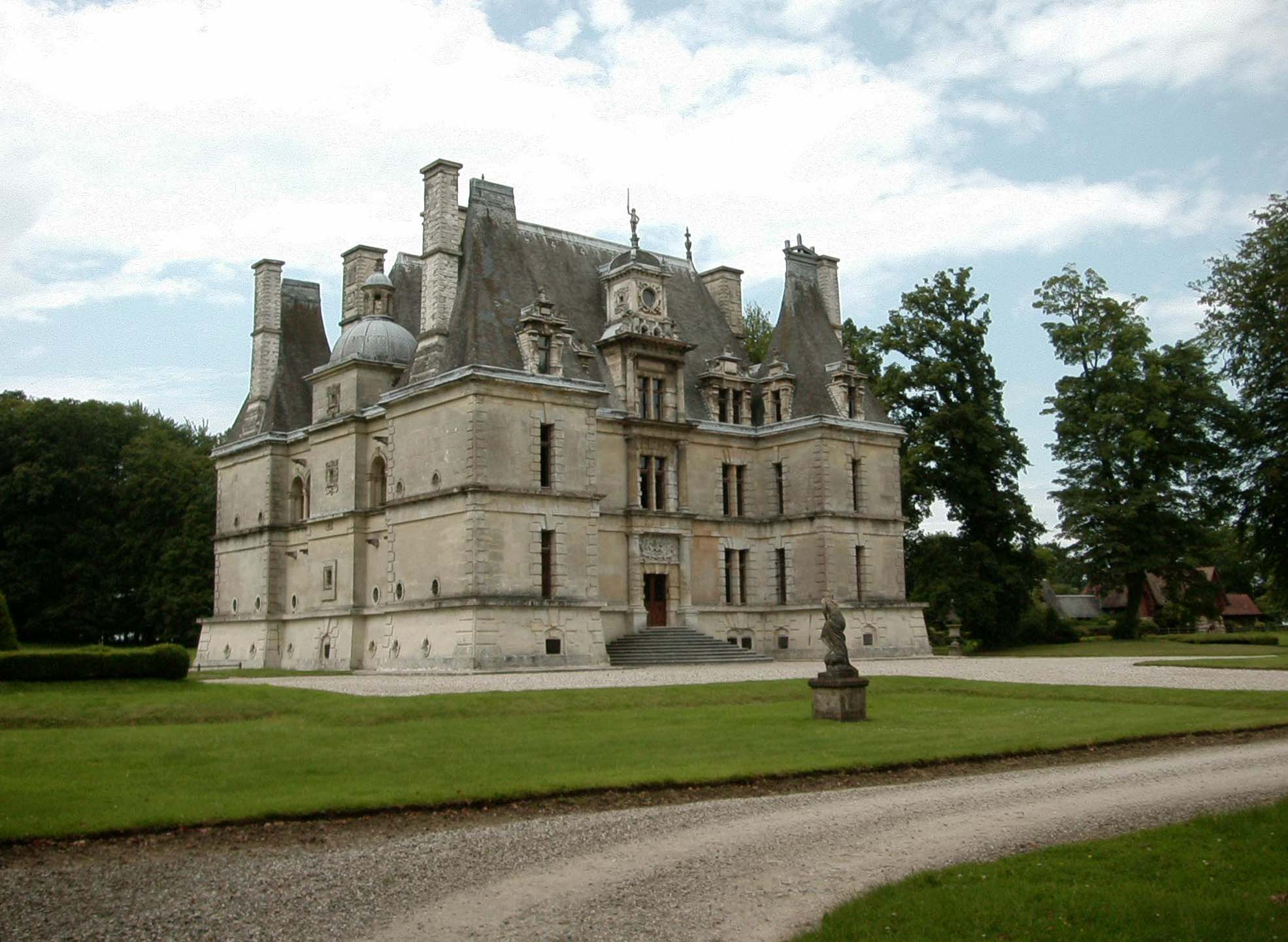 Schloss Bailleul, Normandie Datum: 04.2005 Urheber: M. Pfeiffer alias Benutzer:Gordito1869 Quelle: privates Fotoarchiv des Urhebers